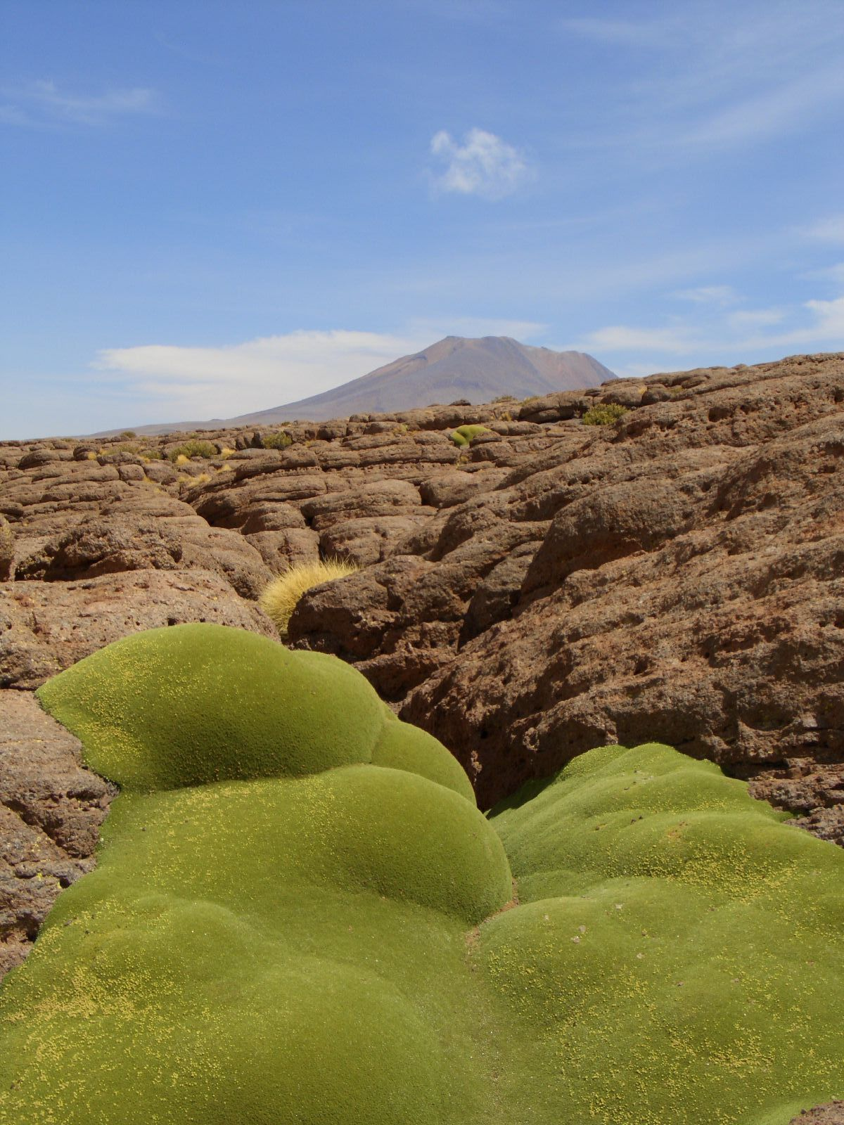 Day 2